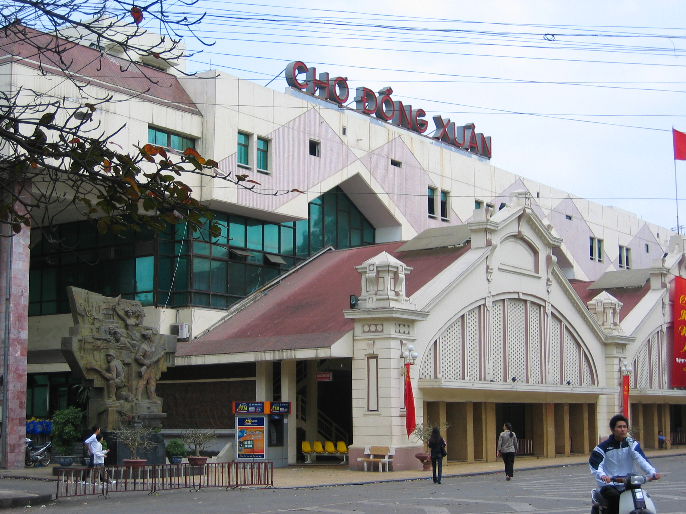 Dong Xuan market, Hanoi, Vietnam.